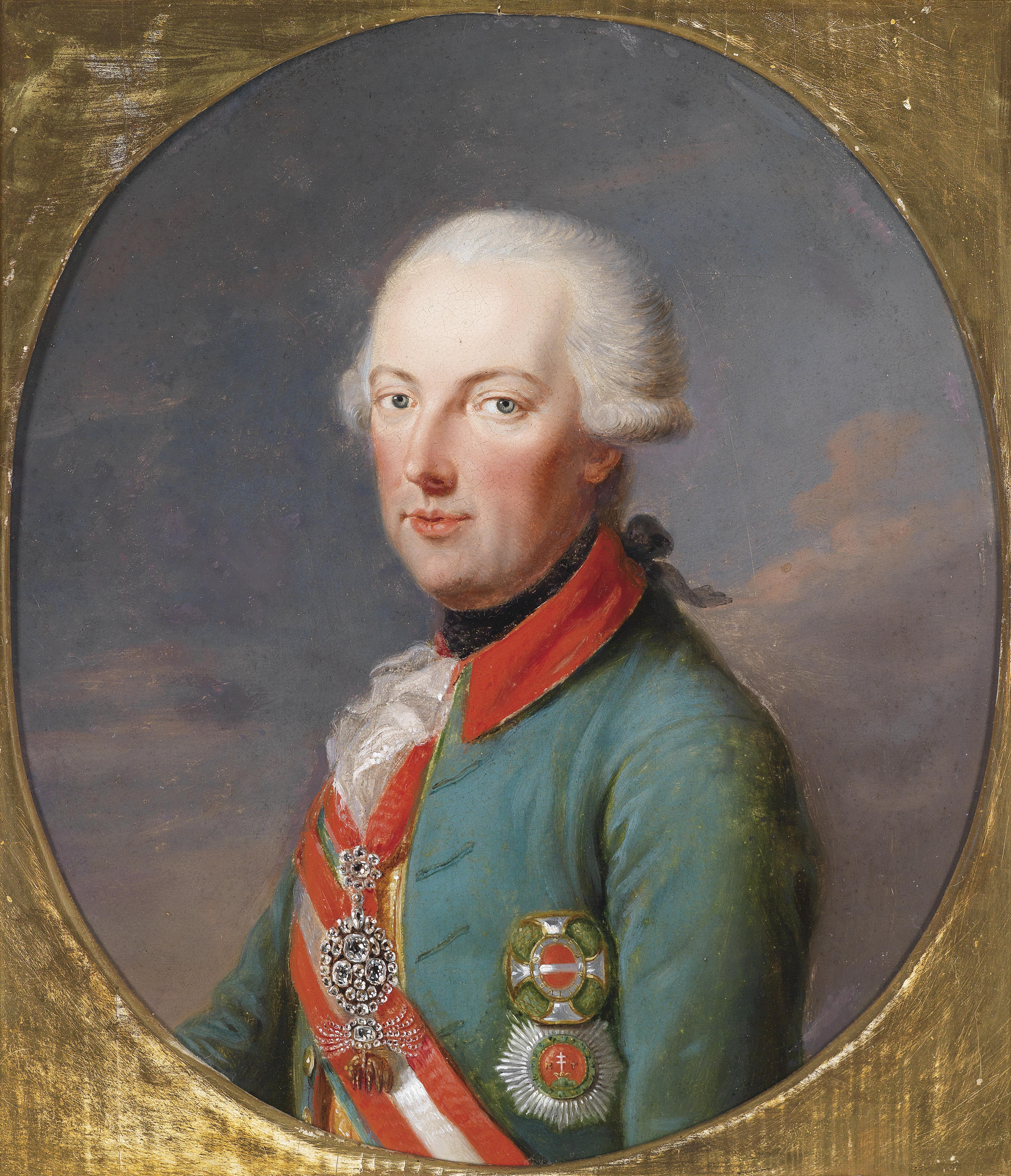 Kaiser Josef II. in der Offiziersuniform der Chevaux Legers mit dem Orden vom Goldenen Vlies in Brillanten, dem Maria-Theresienorden und dem Stephansordenlabel QS:Lde,"Kaiser Josef II. in der Offiziersuniform der Chevaux Legers mit dem Orden vom Goldenen Vlies in Brillanten, dem Maria-Theresienorden und dem Stephansorden"